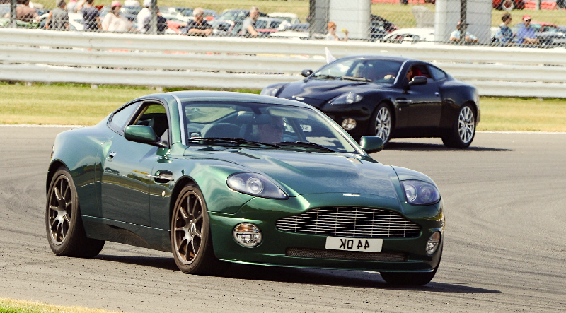 Sur circuit